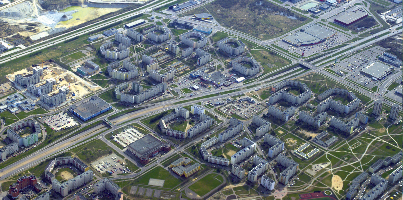 Õhuvaade Mustakivi asumile